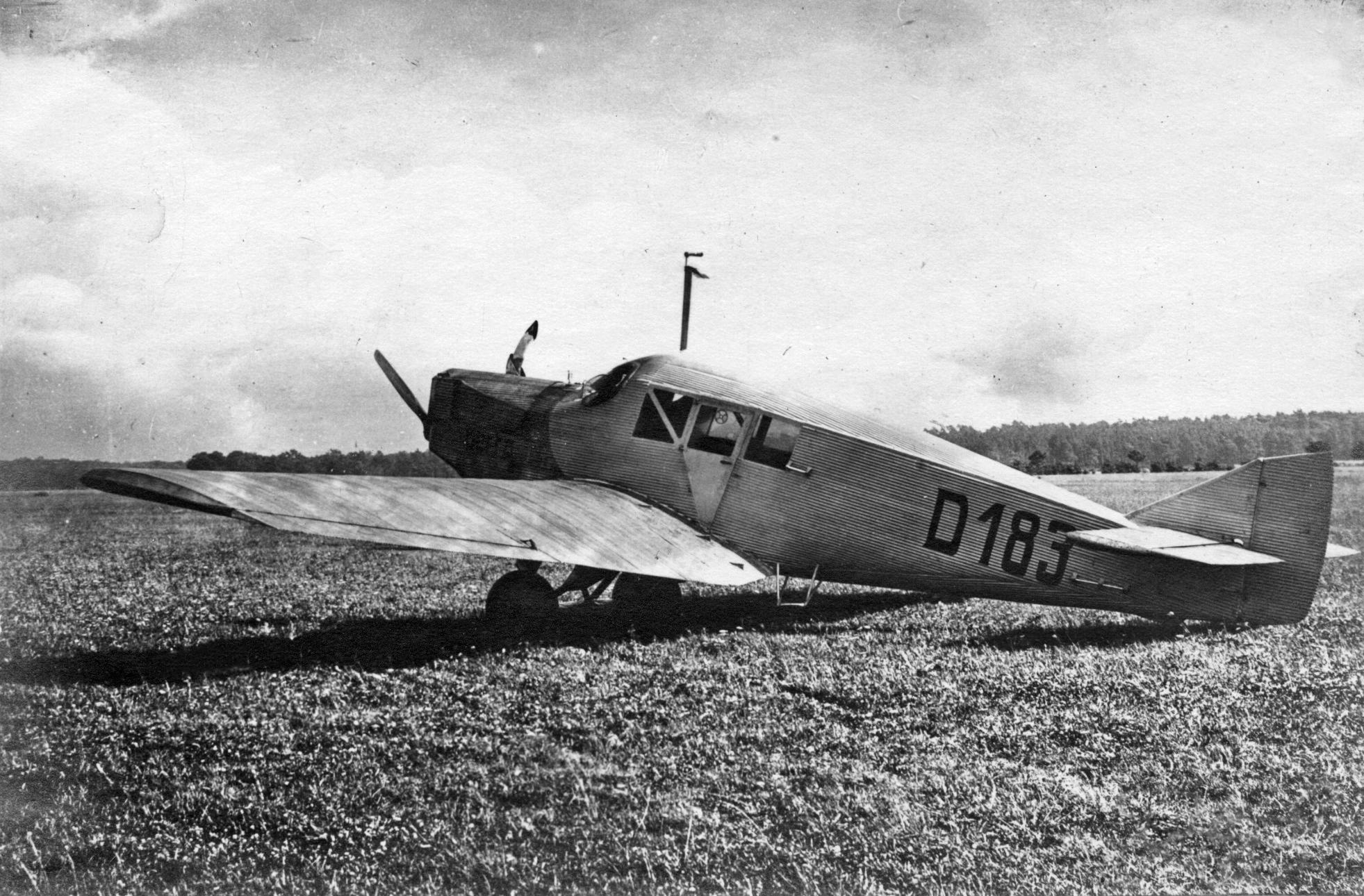 Junkers F 13 Prototyp "Herta" mit der am 18. Juli 1919 vergebenen Zulassungsnummer D-183